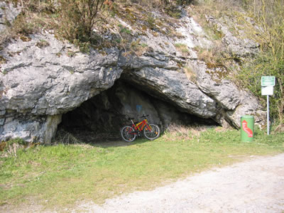 Kulturhöhle „Hohler Stein“ im Lörmecketal bei Rüthen-Kallenhardt.